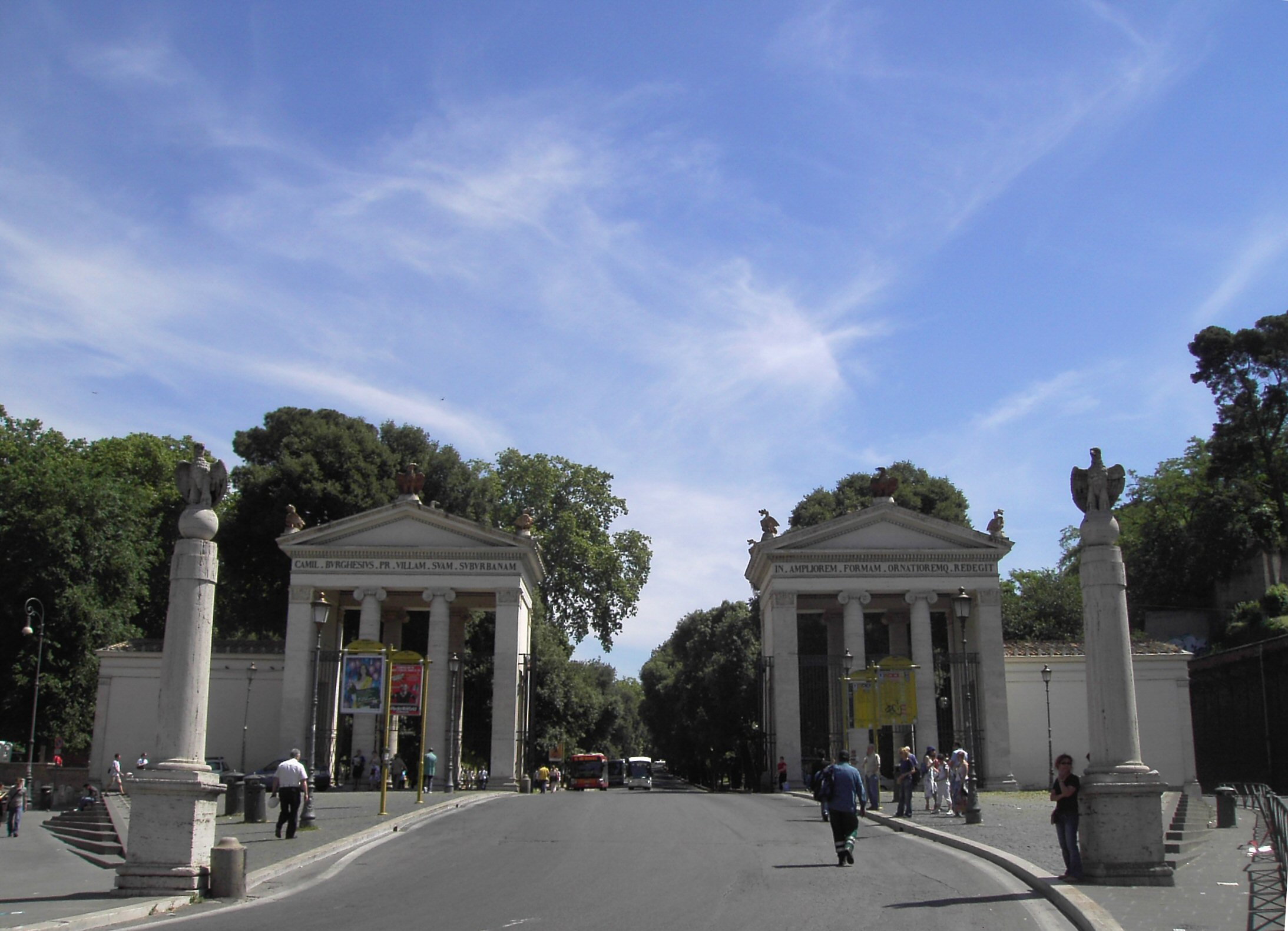 Roma , Villa Borghese: Portale su piazzale Flaminio (Luigi Canina, 1825 circa)